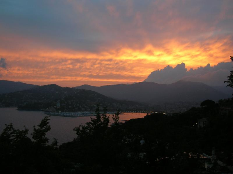 Tramonto su Rapallo